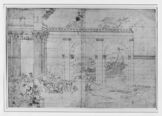 Artist Pierre Paul Puget (1620–1694) Alternative namesPierre Paul PugetDescriptionFrench sculptor, painter and architectDate of birth/death16 October 16202 December 1694Location of birth/deathMarseilleMarseilleWork locationMarseille, Genoa, ToulonAuthority control : Q371979 VIAF: 27116225 ISNI: 0000 0001 2095 8062 ULAN: 500014694 LCCN: n86082681 WGA: PUGET, Pierre WorldCat Title